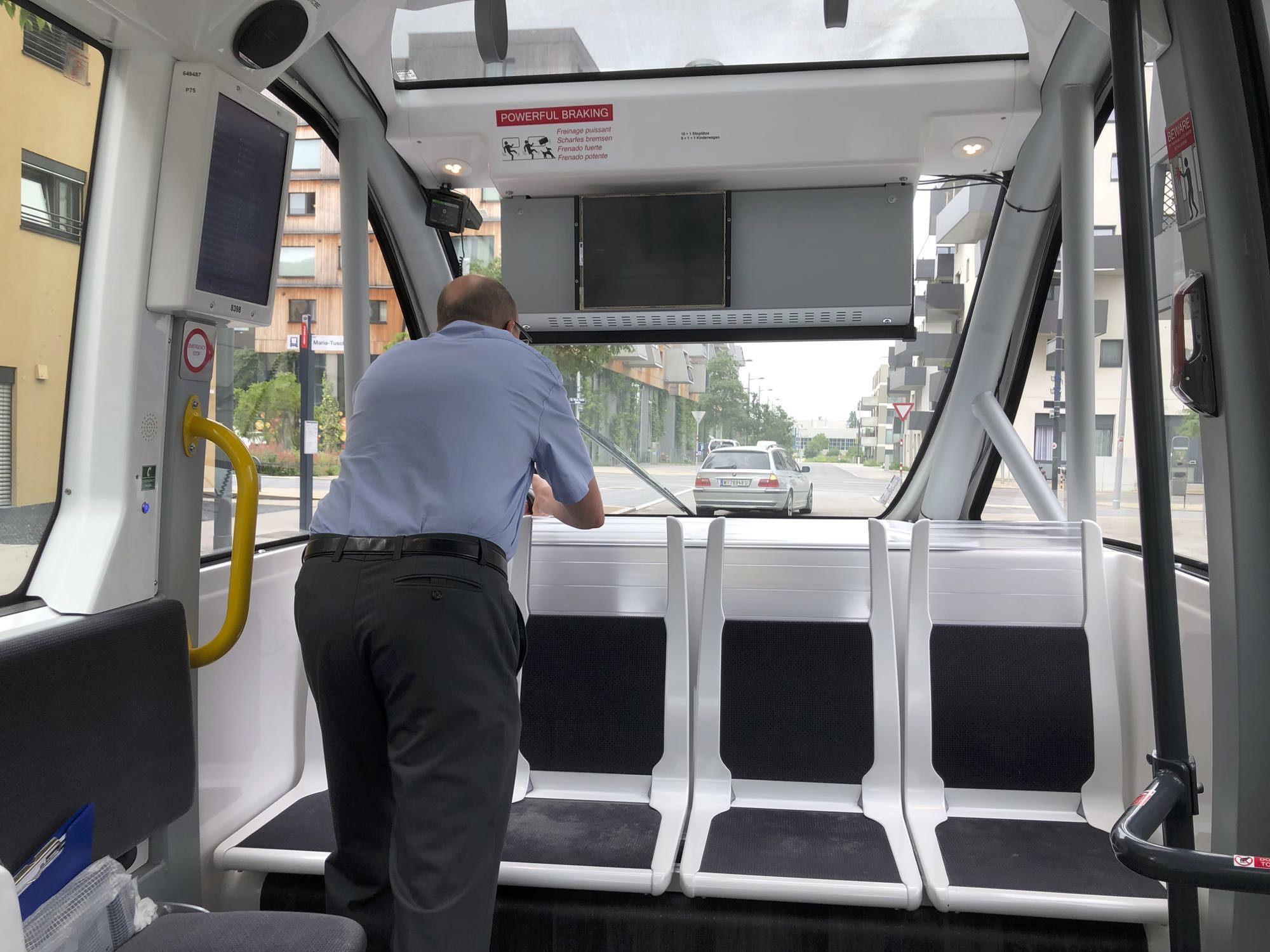 Navya teilautonomer Bus wird nach Ausfall von Wiener-Linien-Operator mit XBox-Bedienung händisch gesteuert